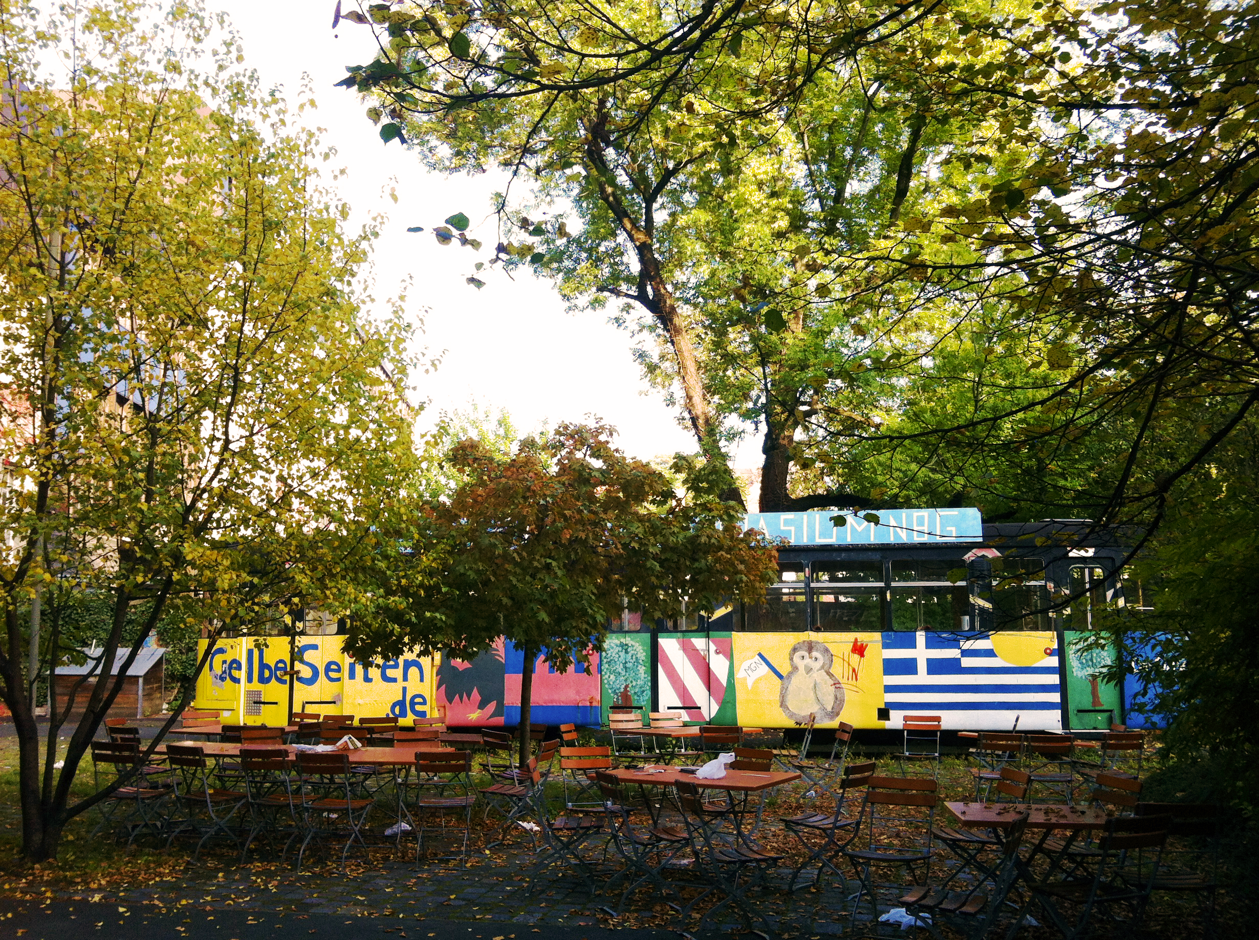 Straßenbahncafe des Melanchthon-Gymnasium Nürnberg